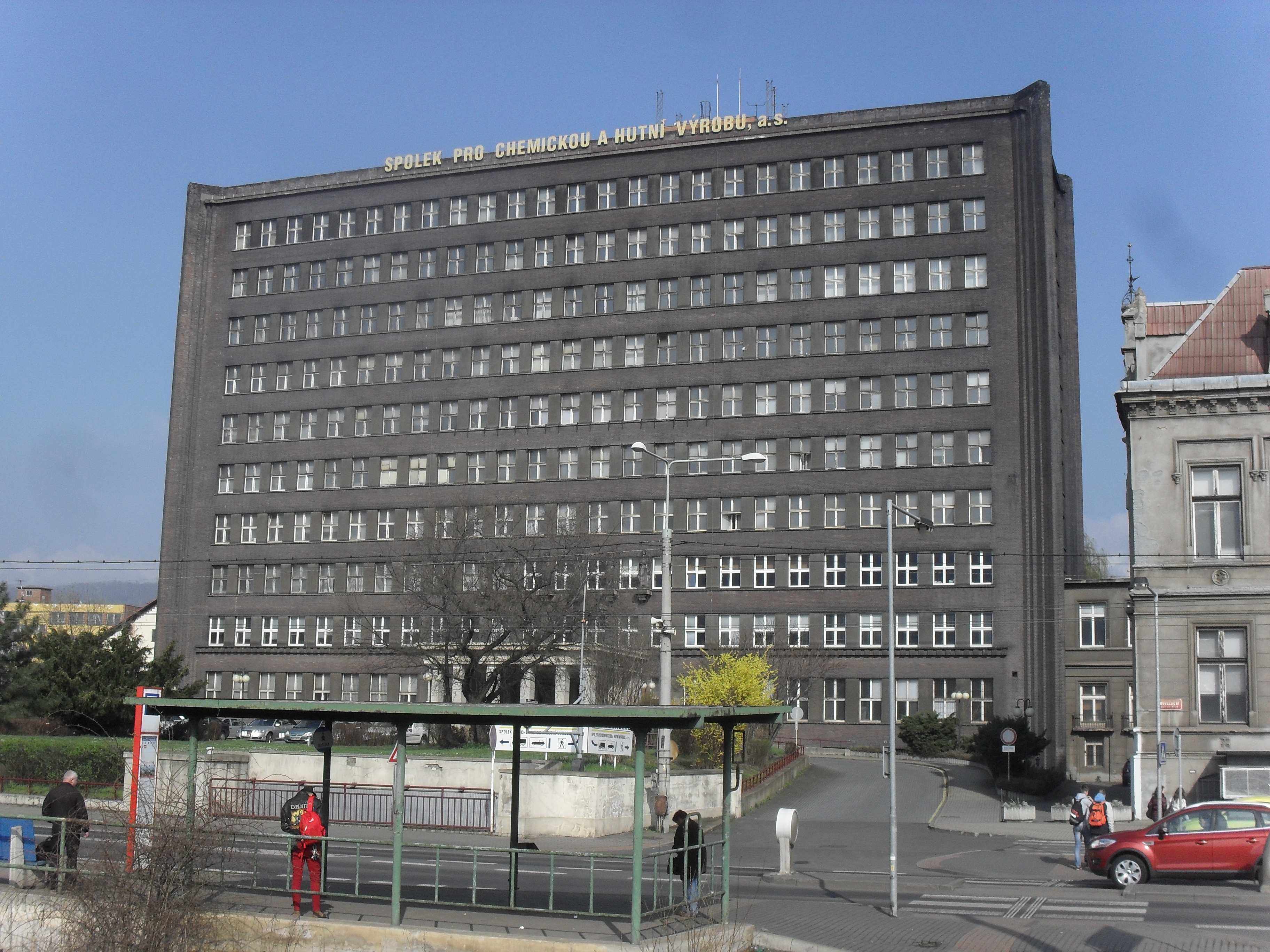 Správní budova Ústecké Spolchemie.